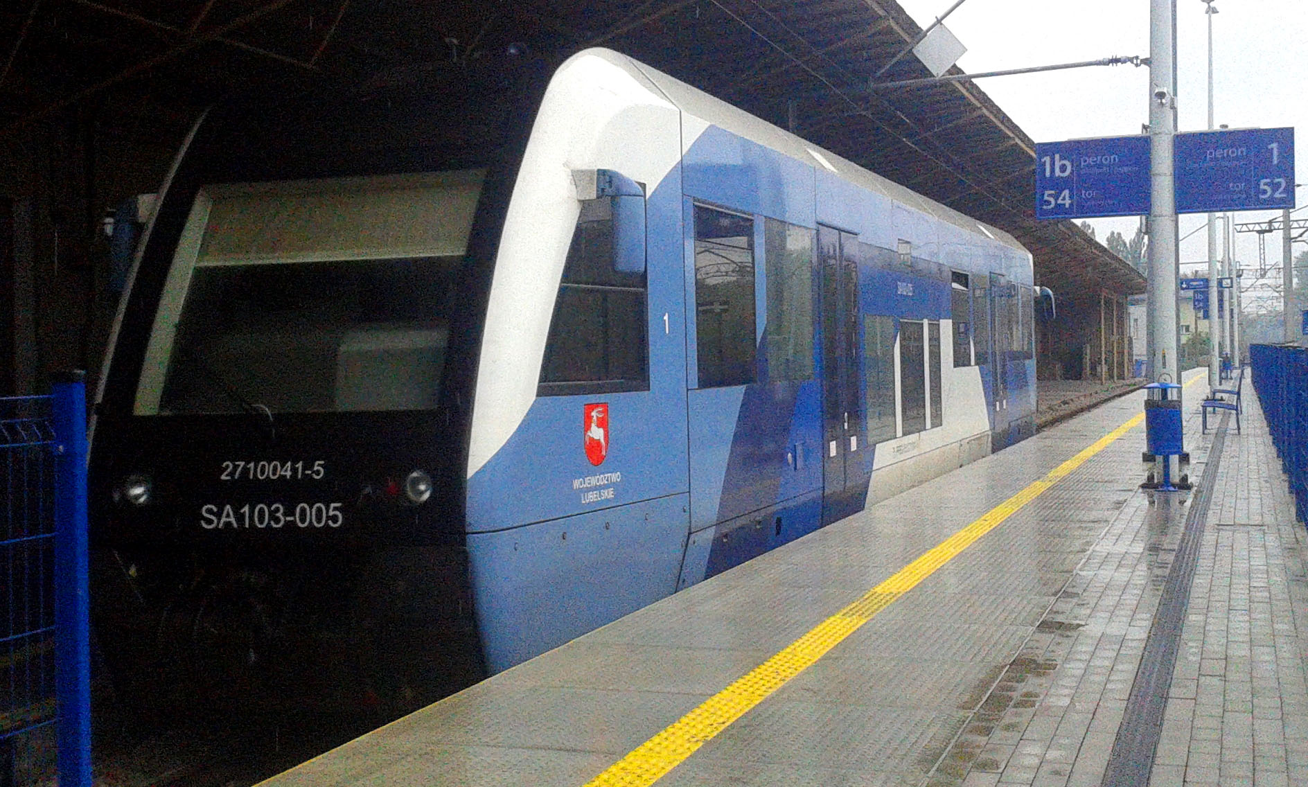 SA103-005 w Lublinie